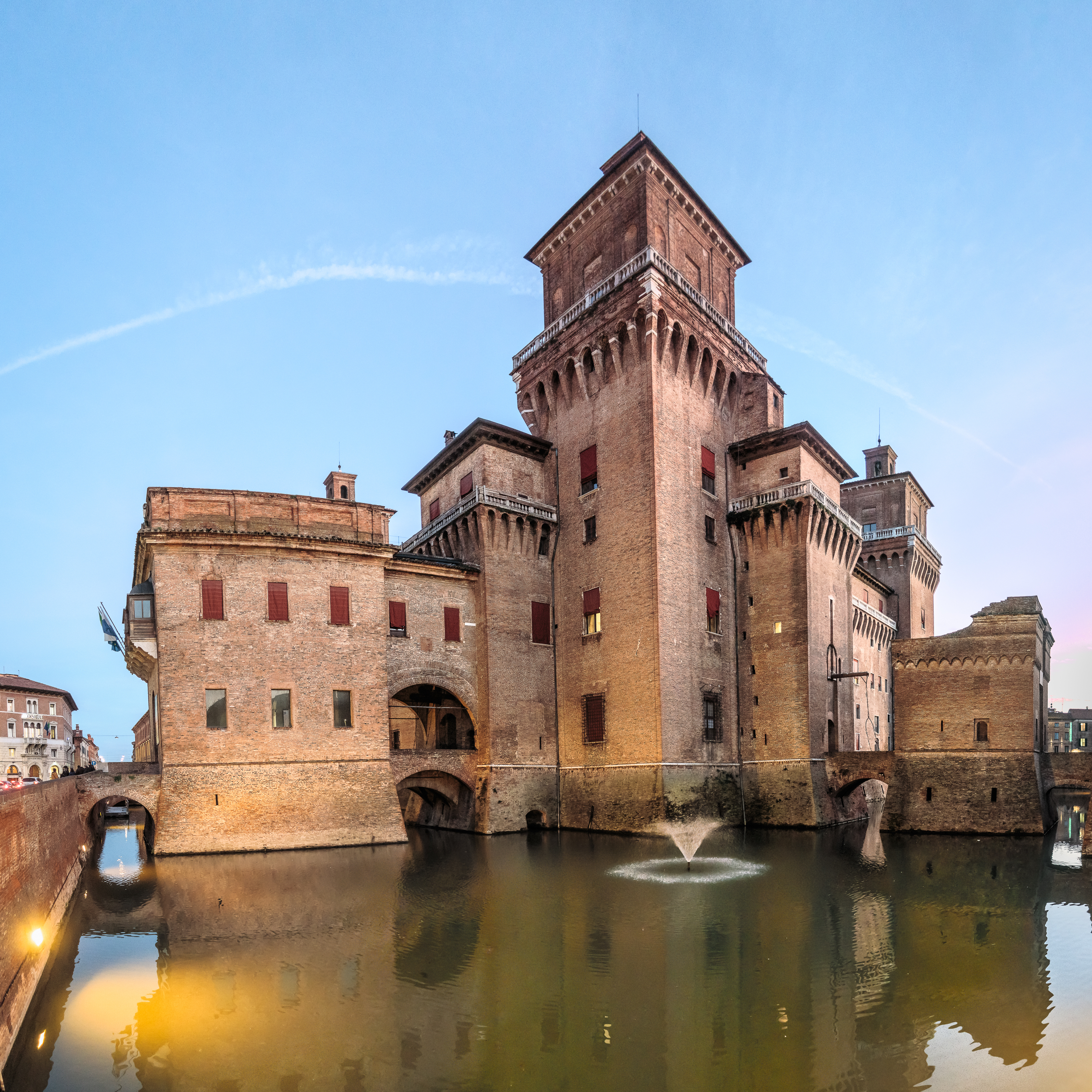 castello Estense This is a photo of a monument which is part of cultural heritage of Italy.